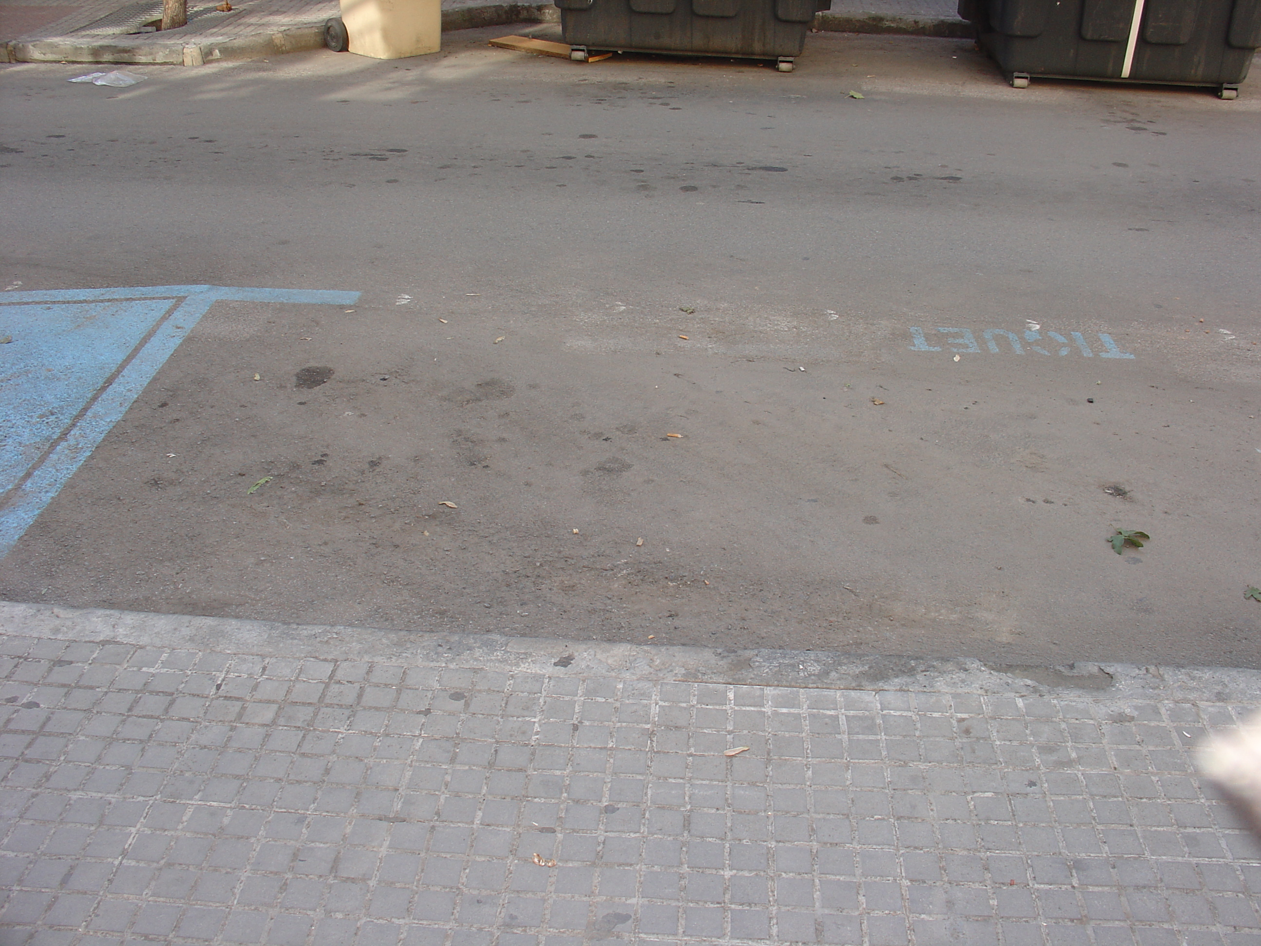 Payment Parking